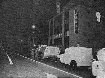 三菱銀行人質事件の現場に展開する特型警備車F-7型など警察車両。